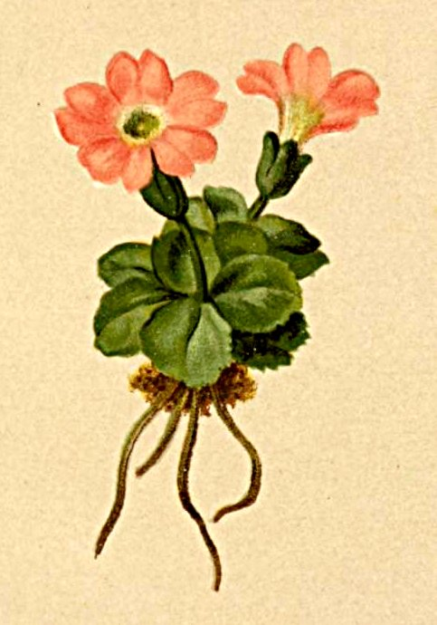 Primula tiroliensis